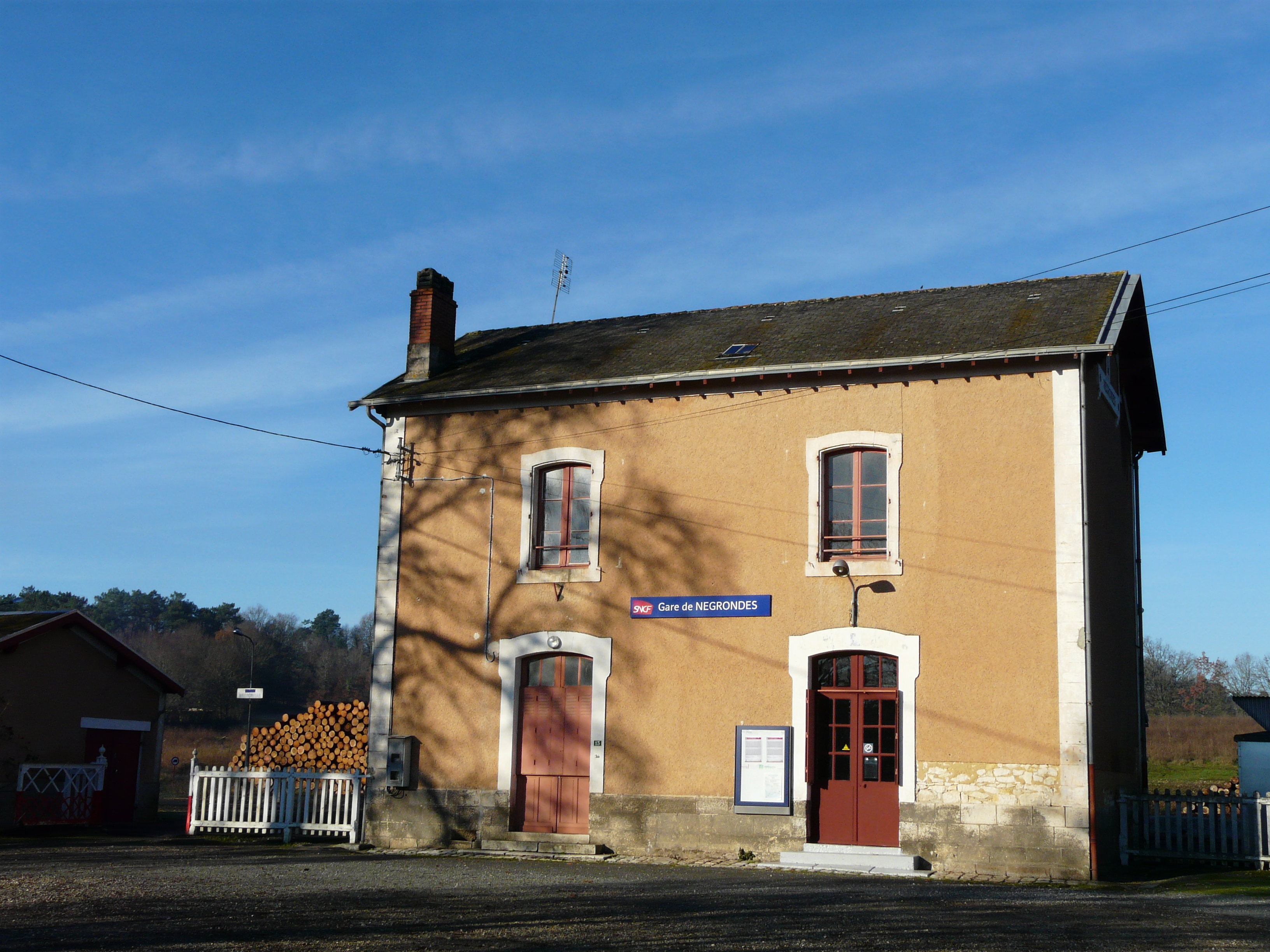 La gare de Négrondes, Dordogne, France.